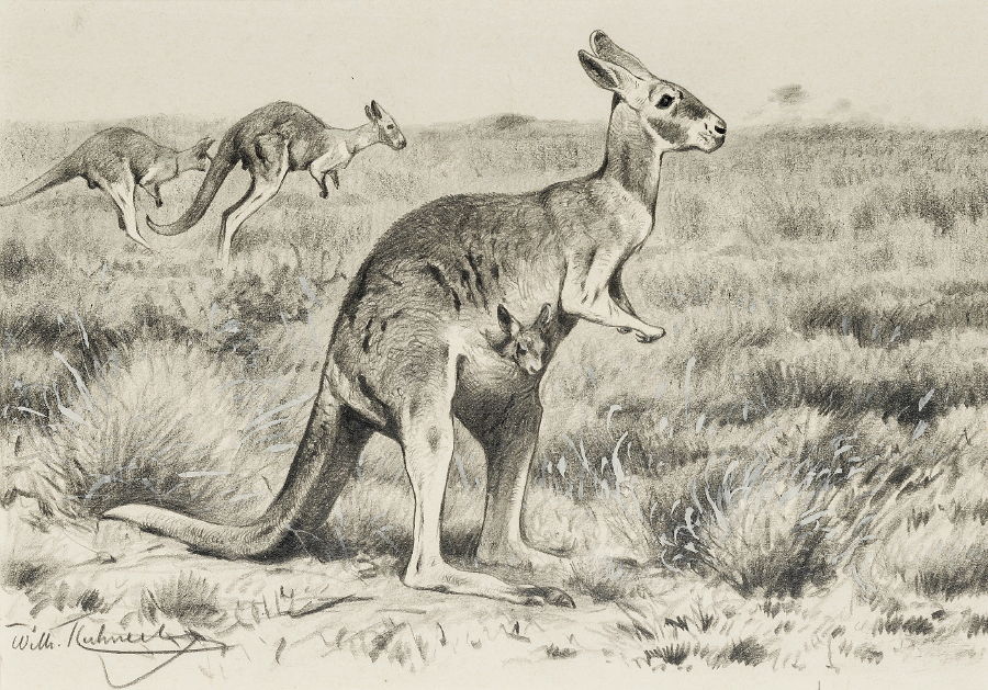 Wilhelm Kuhnert: Kängurus, Bleistift und Deckweiß auf Papier, 13,5 x 18,5 cm, Links unten signiert